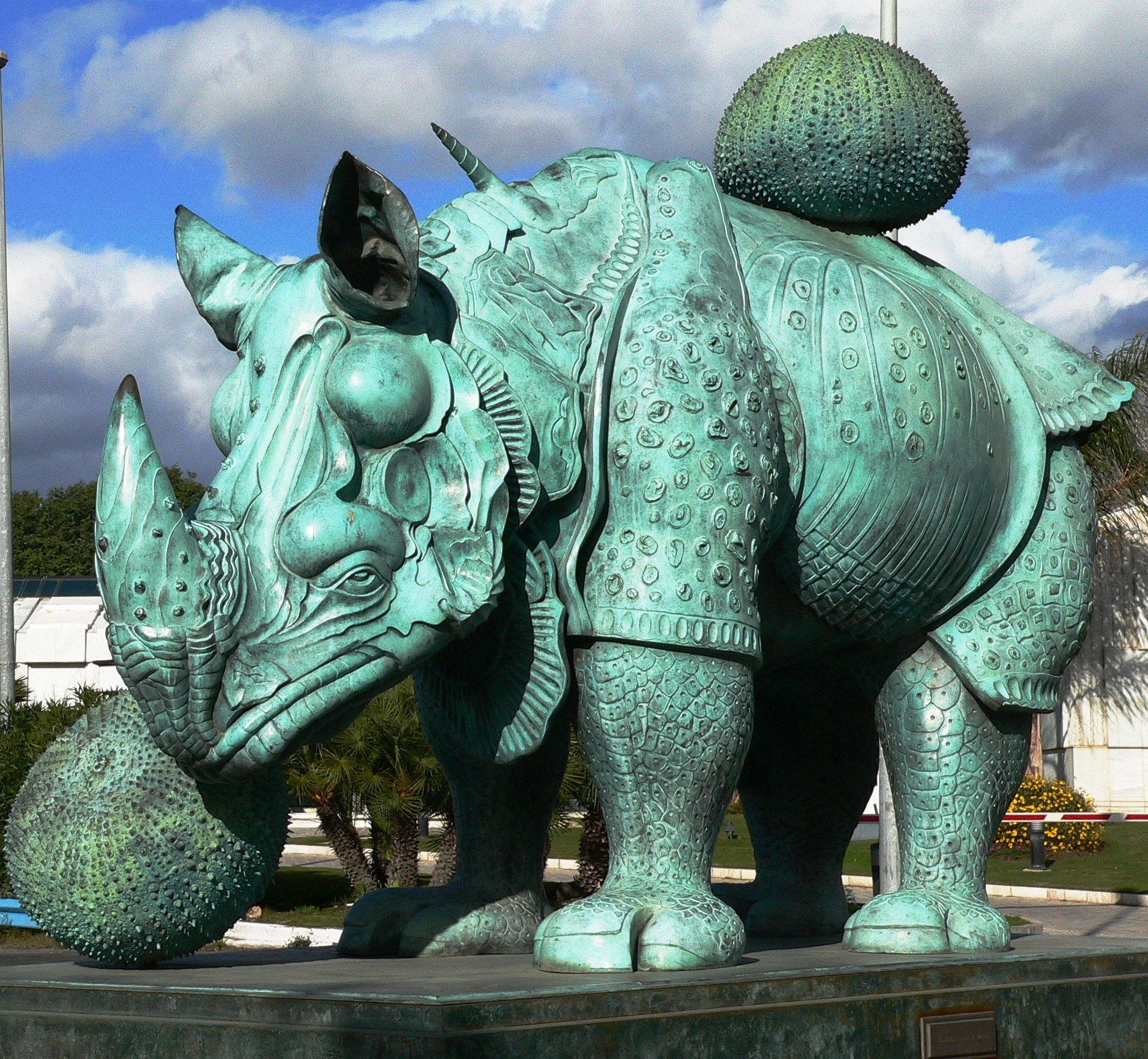 Rhinoceros